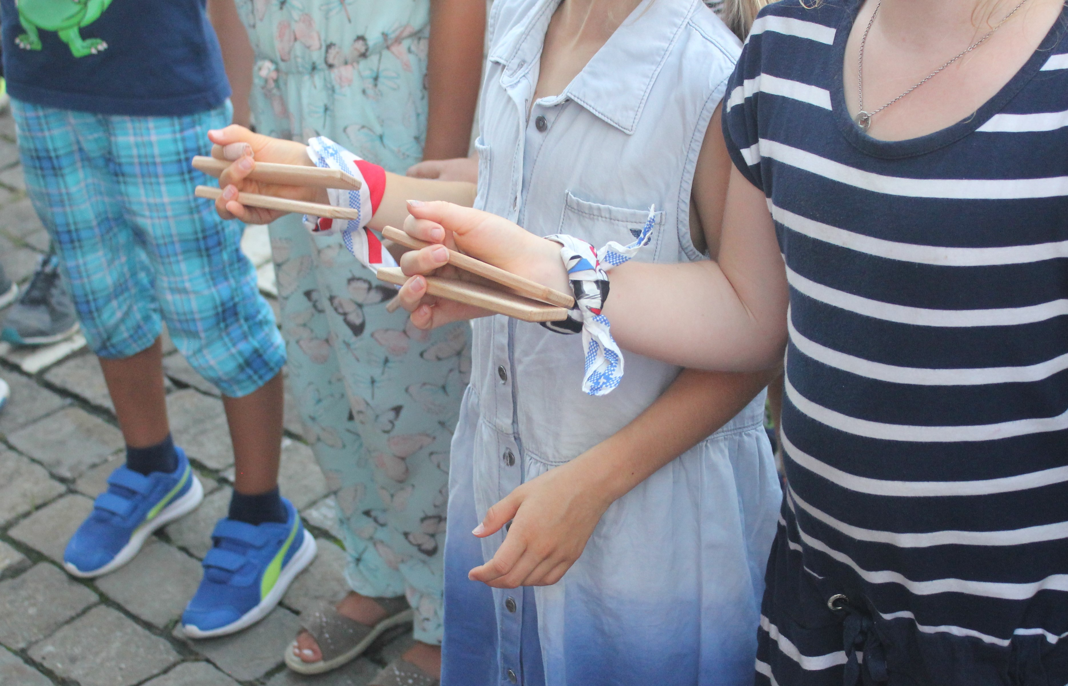 Schulkinder chlefelen gemeinsam an der Eröffnungsfeier.